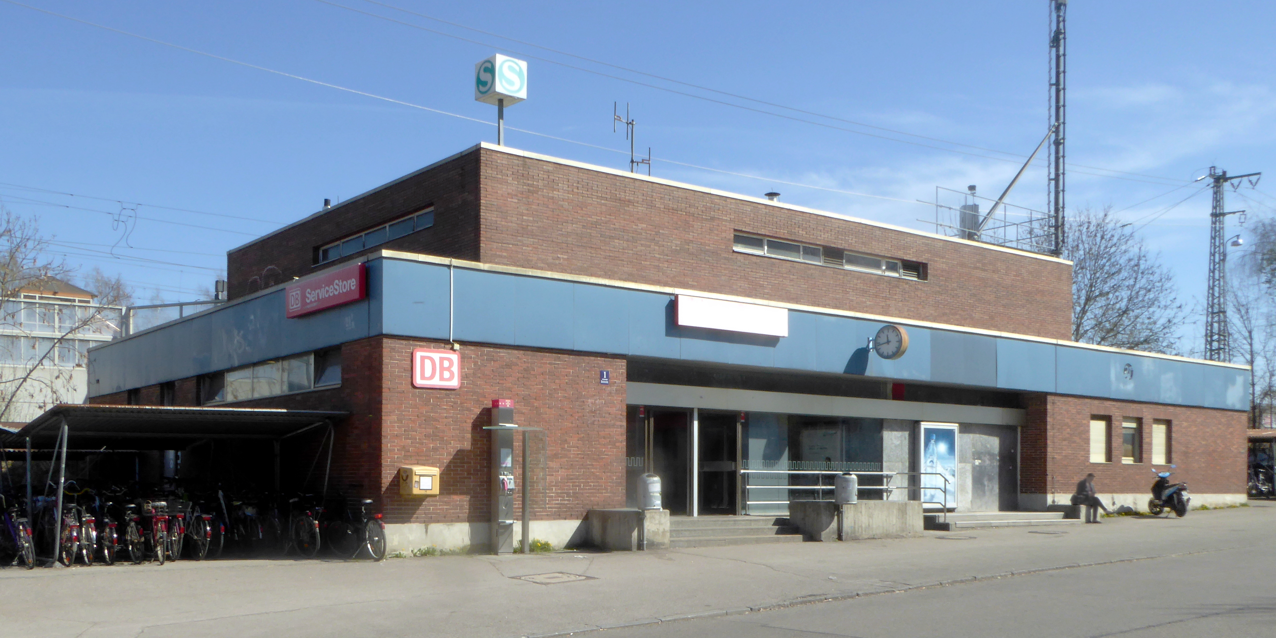 Boarisch: Ojching, da Es-Bahhof vo Sidwestn xeng.